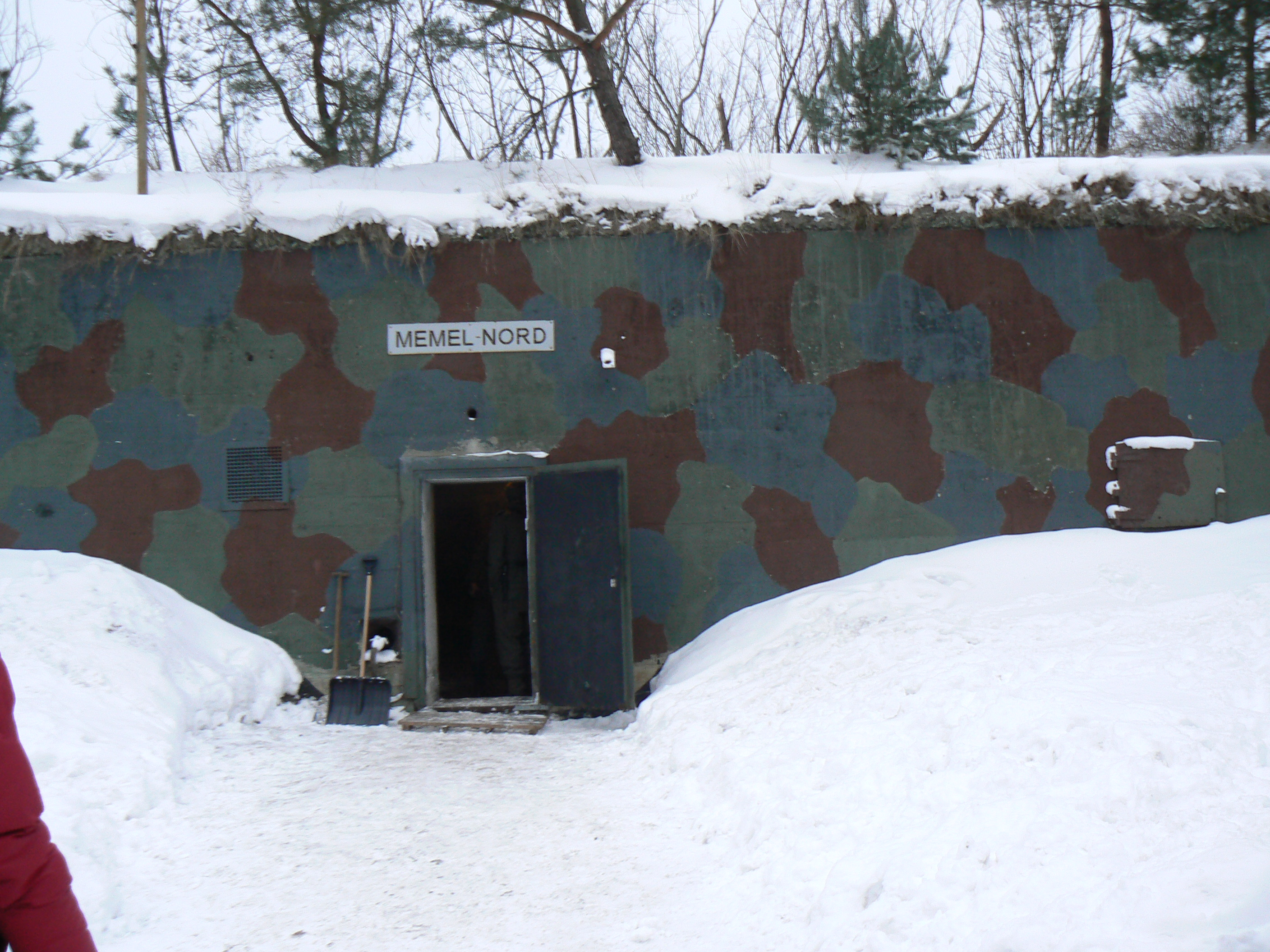 Bunkr Memel Nord (Klajpeda Sever), postavený Němci v roce 1939 jako jeden článek obranné linie, táhnoucí se od Libavy až do Královce. Tento bunkr je na pobřeží Baltského moře v Giruliai (únor)